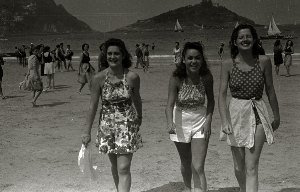 Título original: Bañistas en las playas de Ondarreta y la Concha (7/7) Localización: San Sebastián (Guipúzcoa)